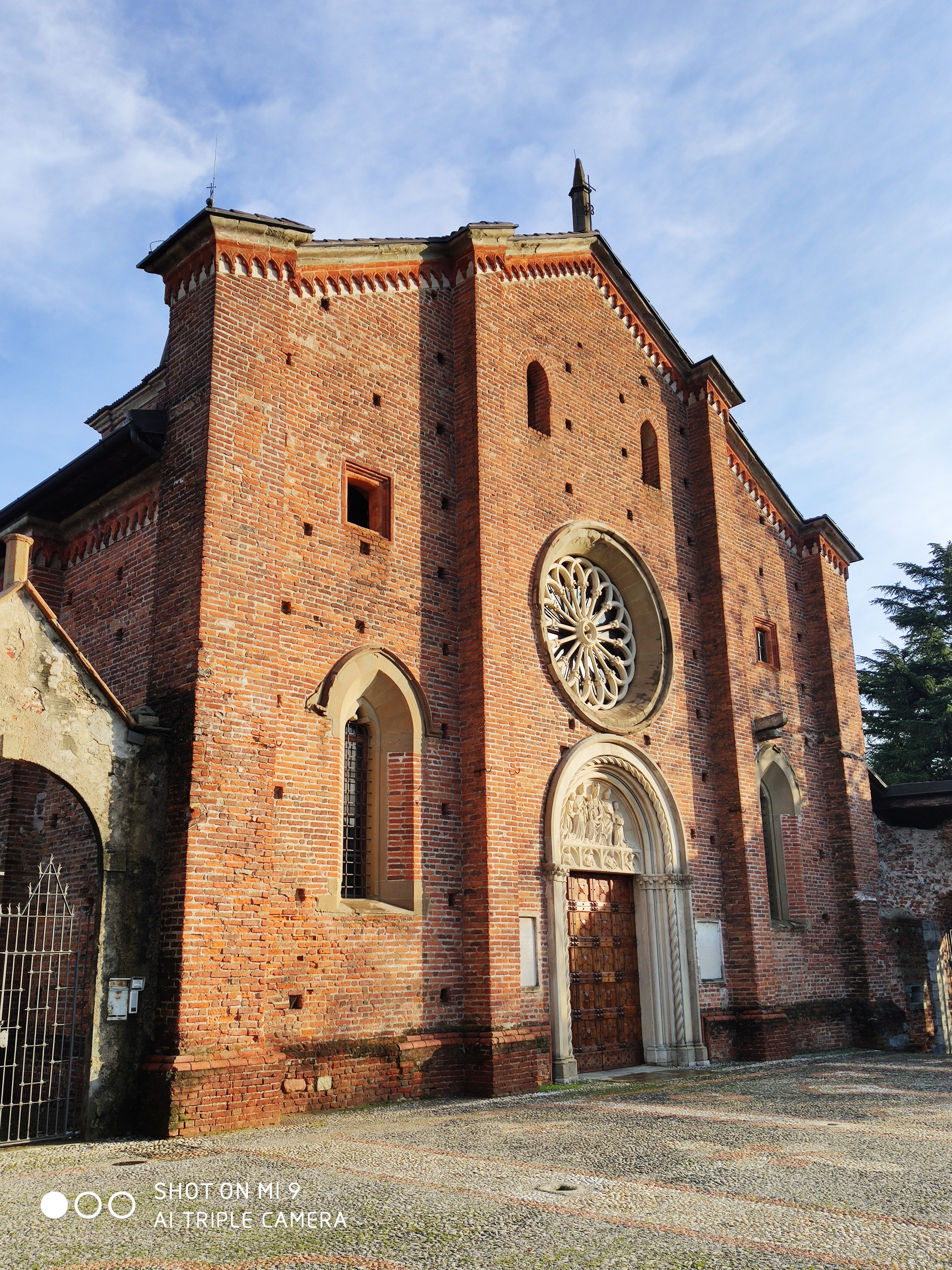 Facciata interamente in mattone rosso Tardo gotico lombardo